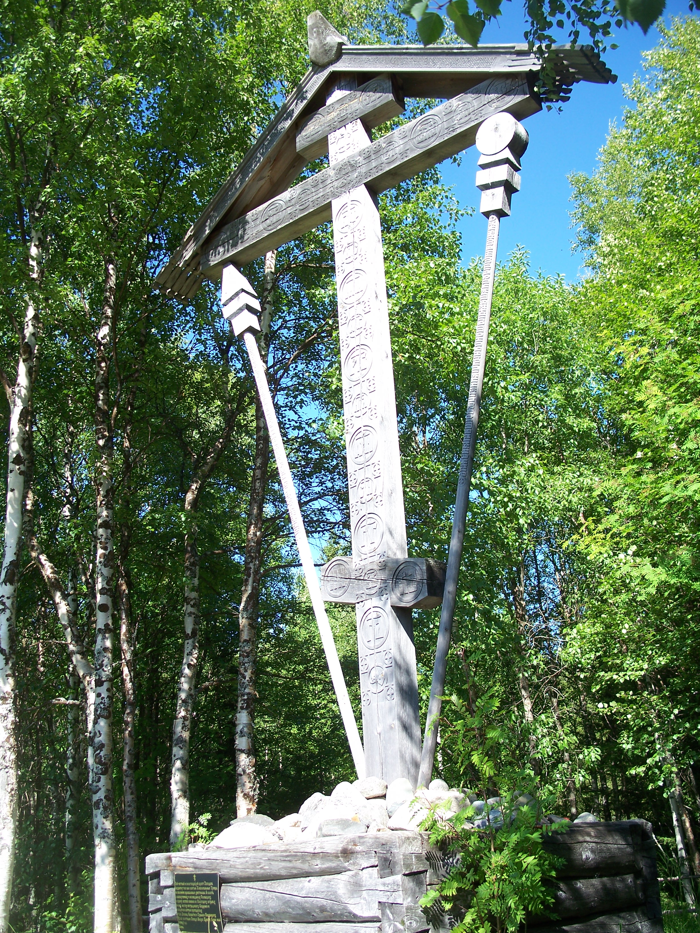 Пустынь Иисусова (Филипповская) (Архангельская область, Архангельск, остров Большой Соловецкий)